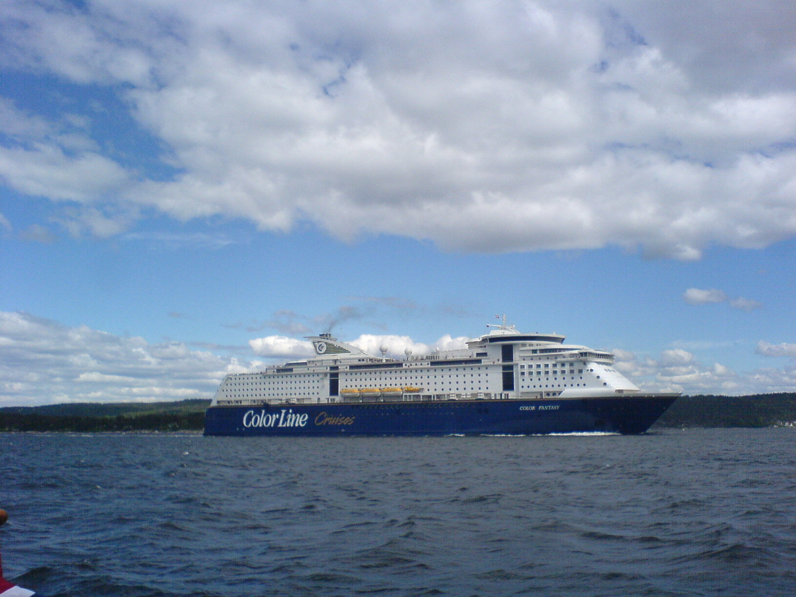 MS Color Fantasy in Oslofjorden